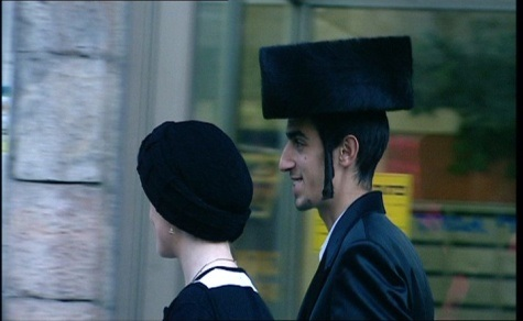 מתוך הסרט התיעודי "הכובעים של ירושלים"